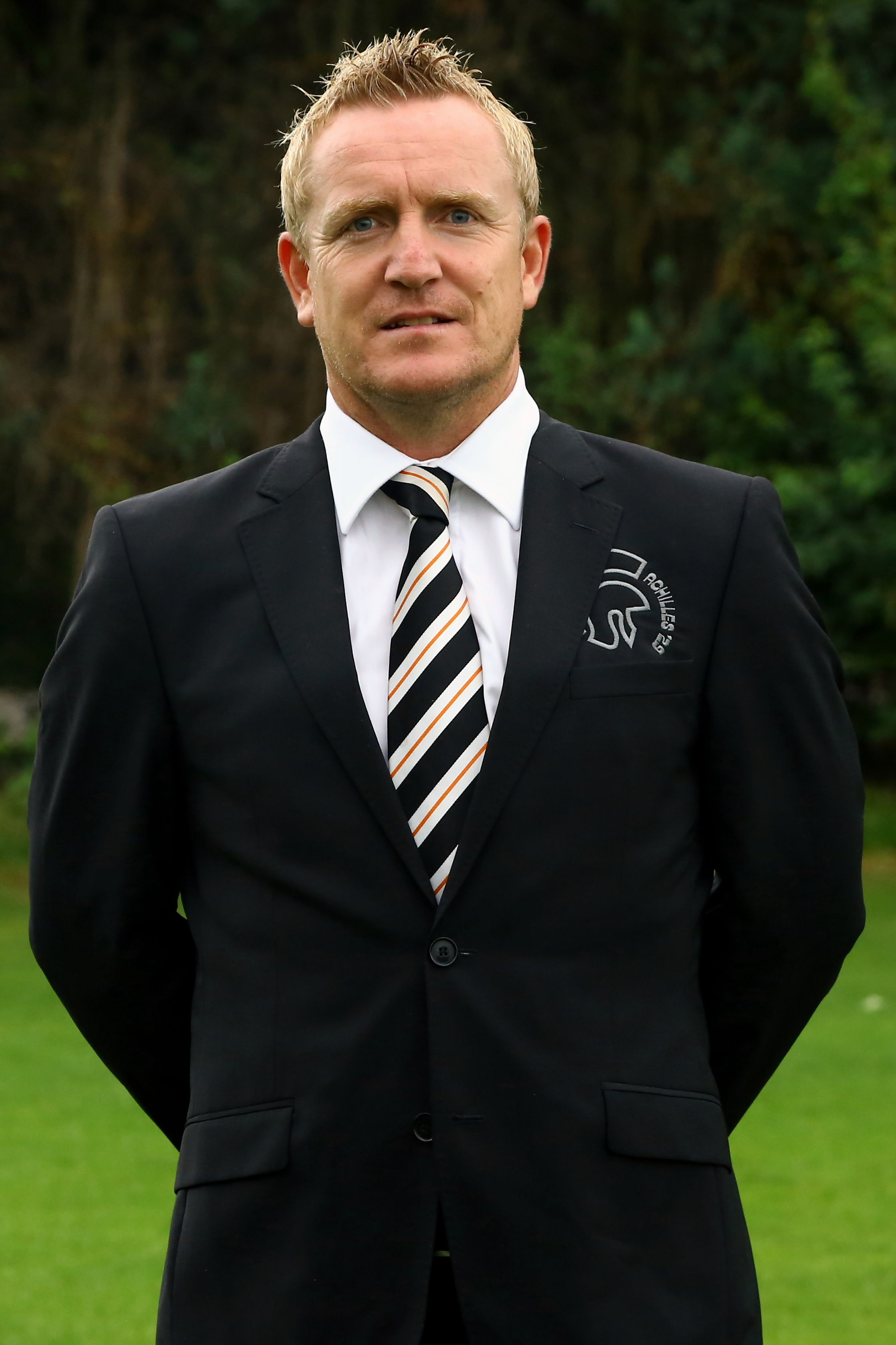 Perspresentatie Achilles'29 Seizoen 2014-2015; François Gesthuizen.